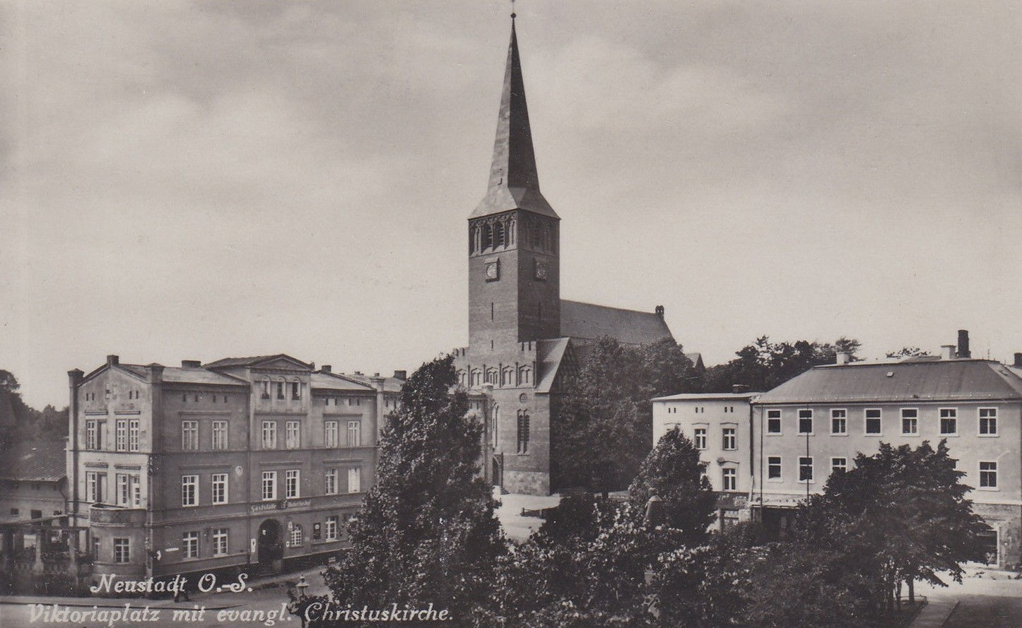 Kościół ewangelicki w Prudniku, plac Szarych Szeregów.